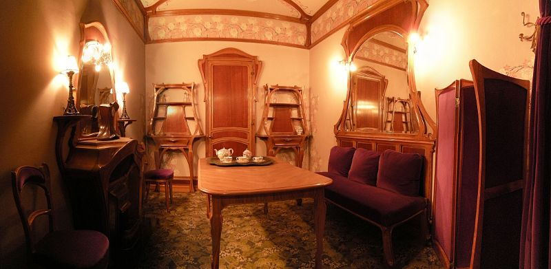 Salon particulier du café de Paris 41 avenue de l'Opéra à Paris (disparu en 1954), conçu par Henri Sauvage (1873-1932), meubles réalisés par Majorelle, musée Carnavalet (Paris)